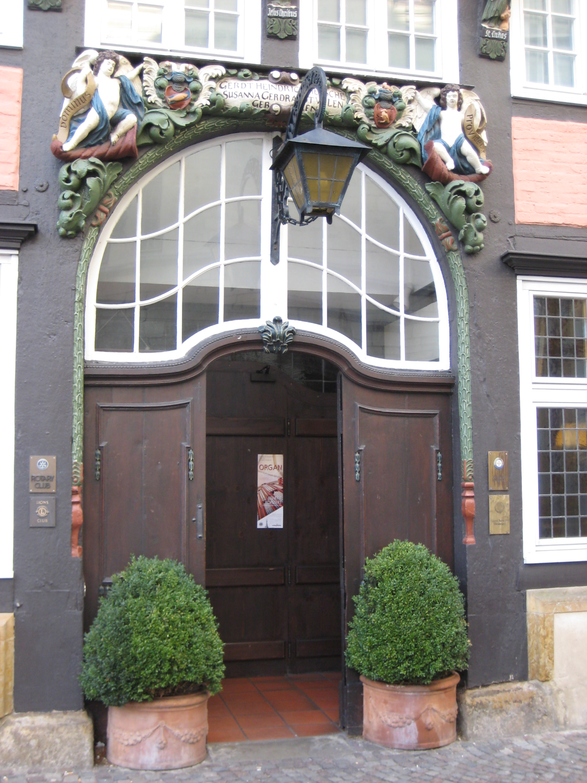 Portal Hotel Walhalla